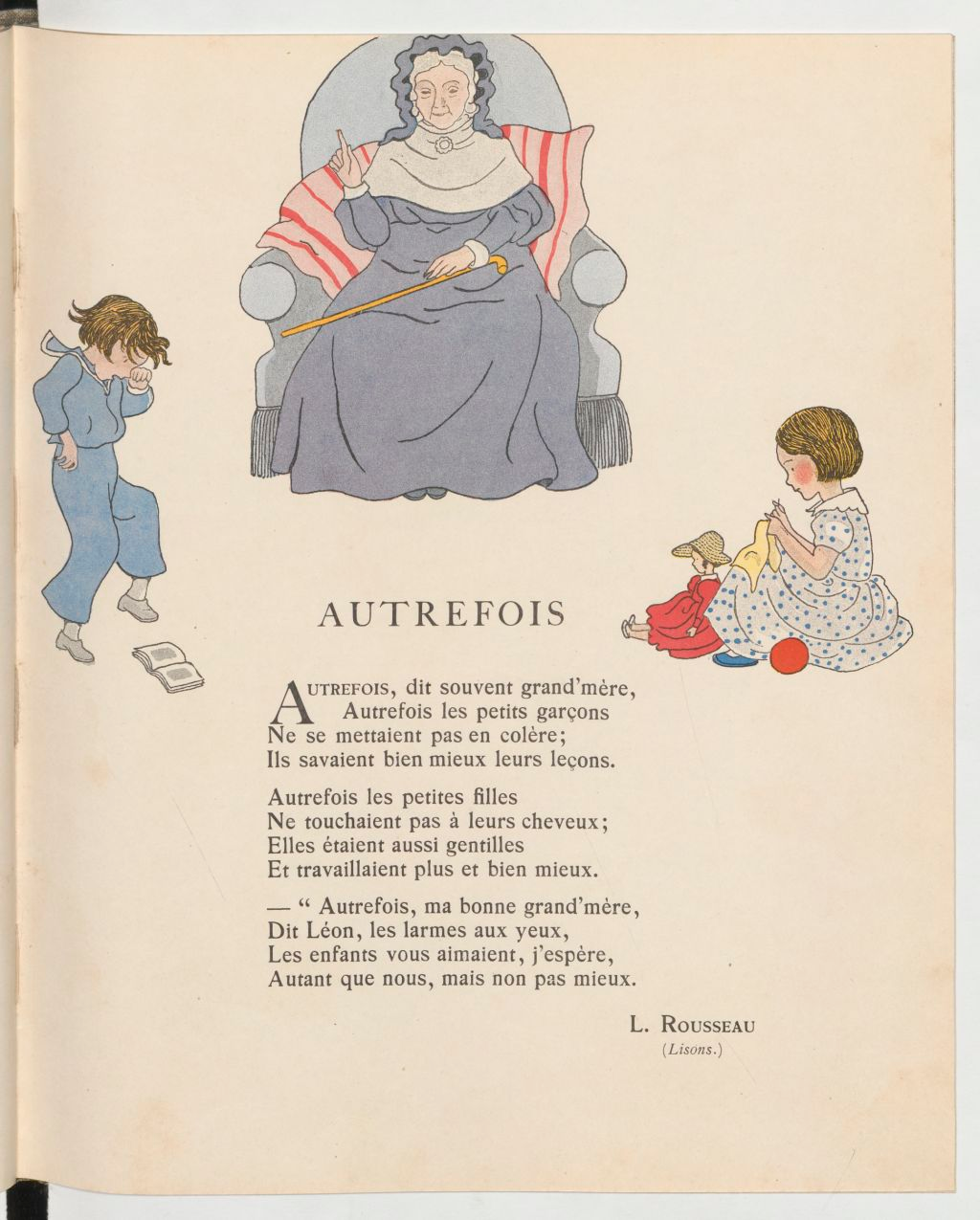 Contes et images, illustrations Marie-Madeleine Franc-Nohain : Autrefois, Louise Rousseau.